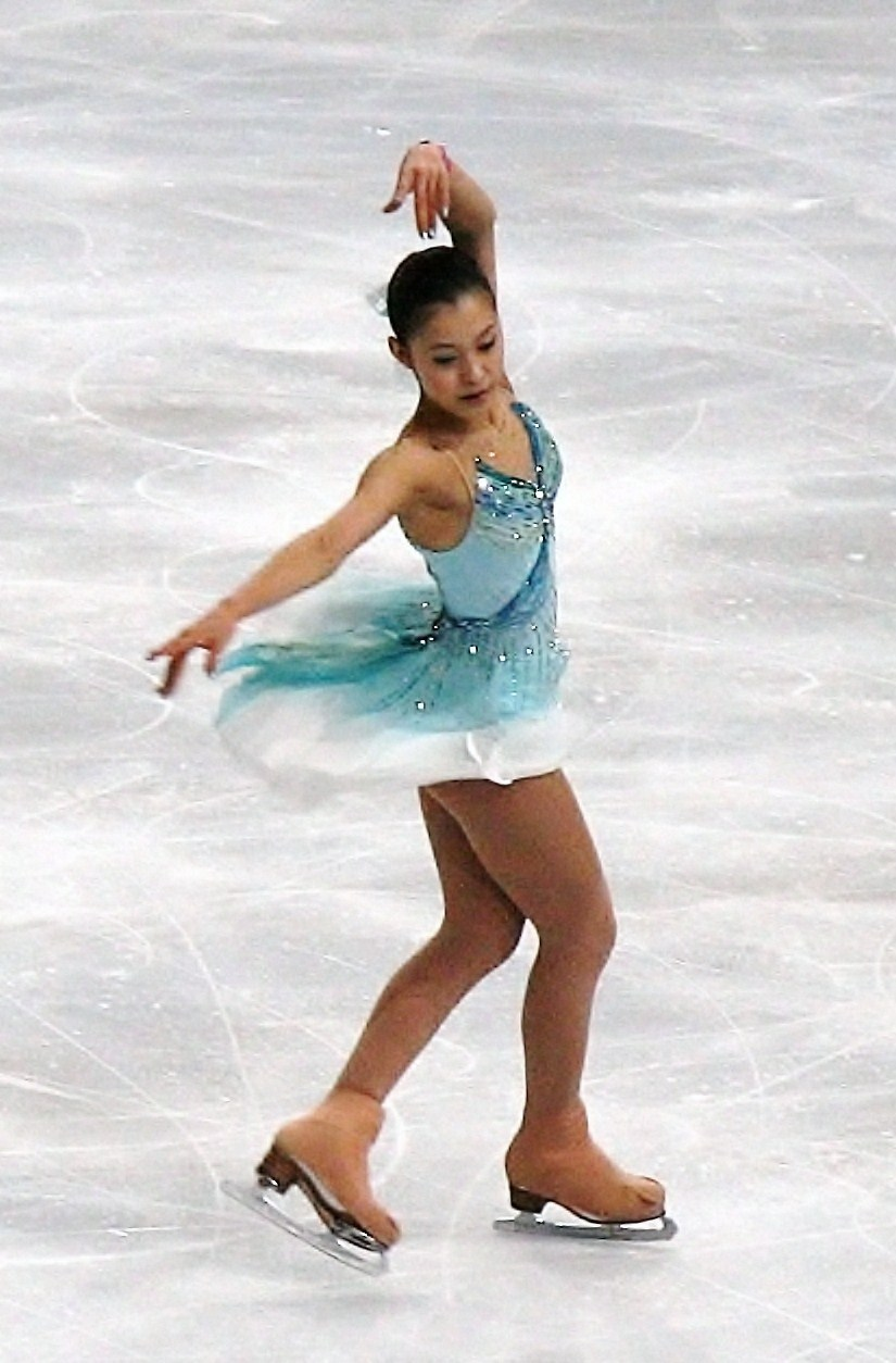 Канако Мураками на 2011 Trophée Eric Bompard.